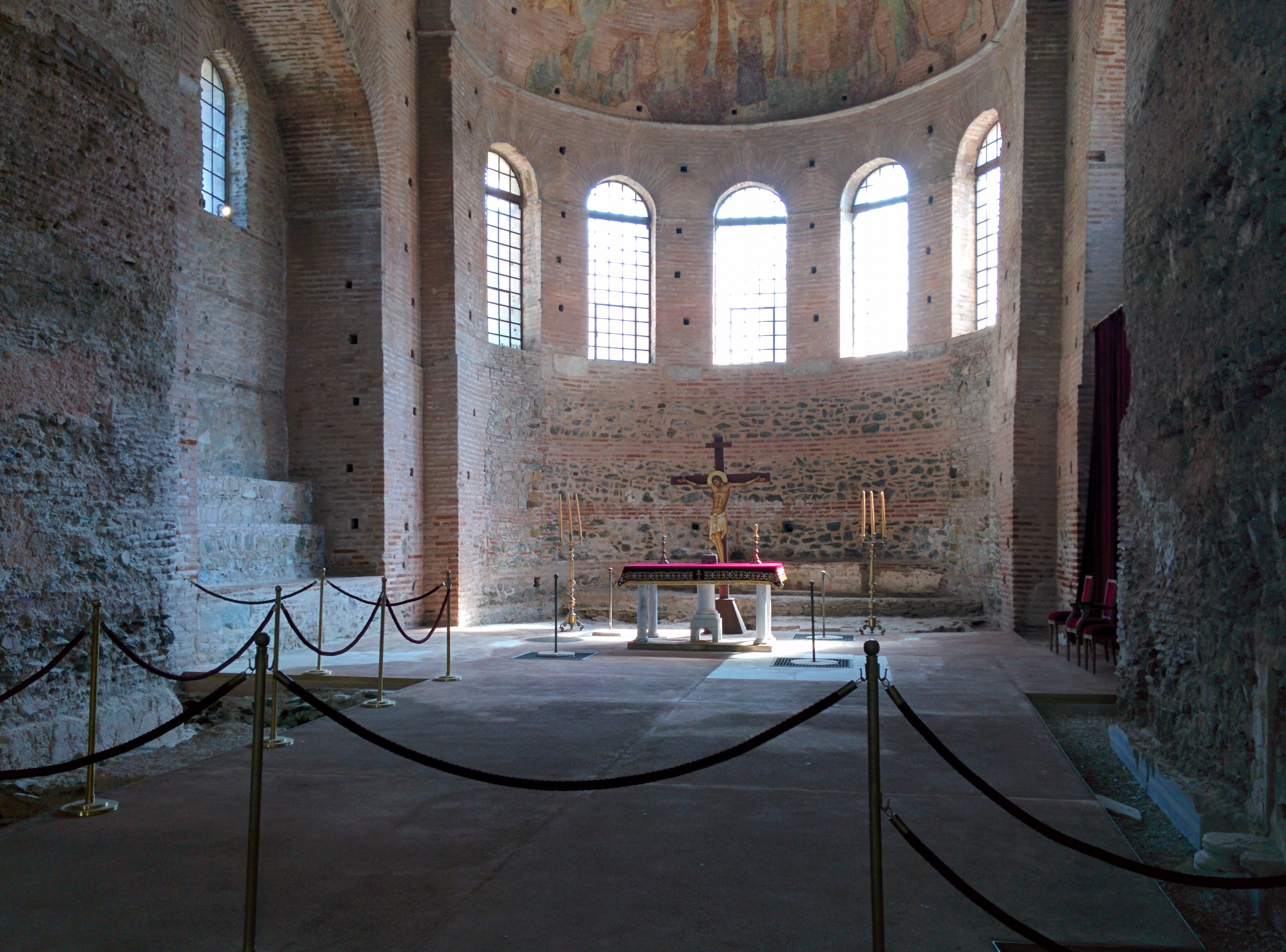 Ροτόντα«Αψίδα Γαλερίου»